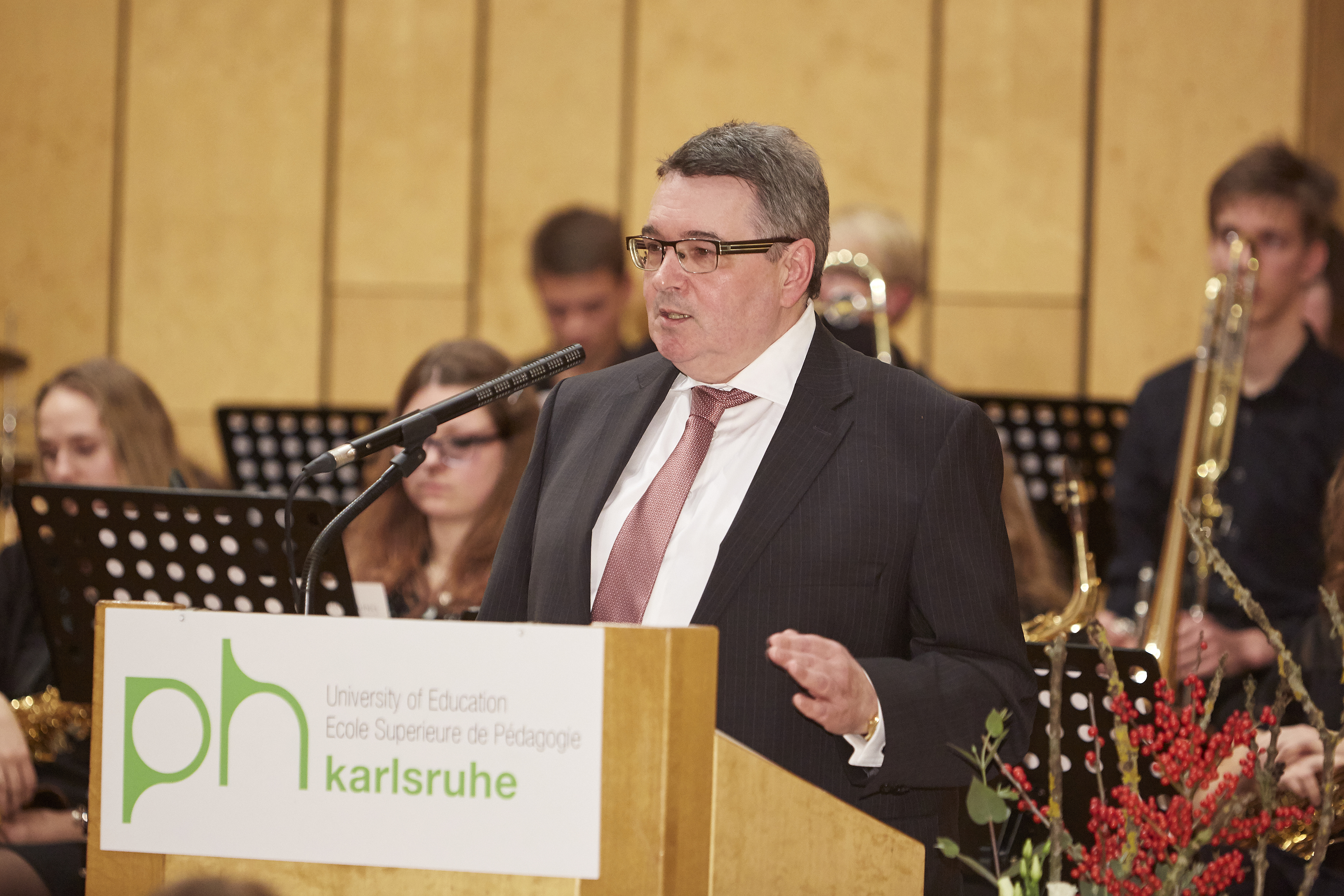 Klaus Peter Rippe - Rektor der Pädagogischen Hochschule Karlsruhe